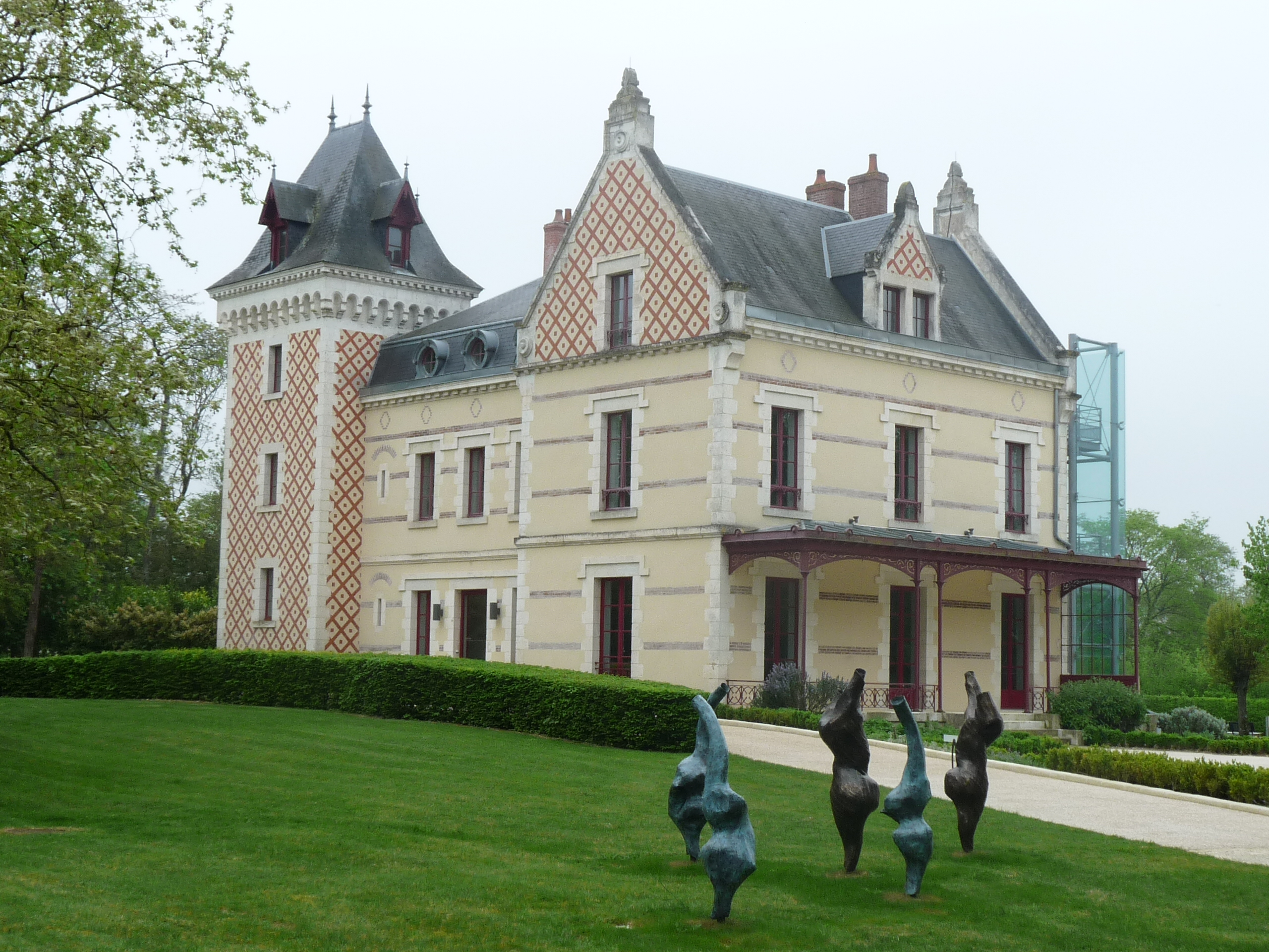 castle of Varye